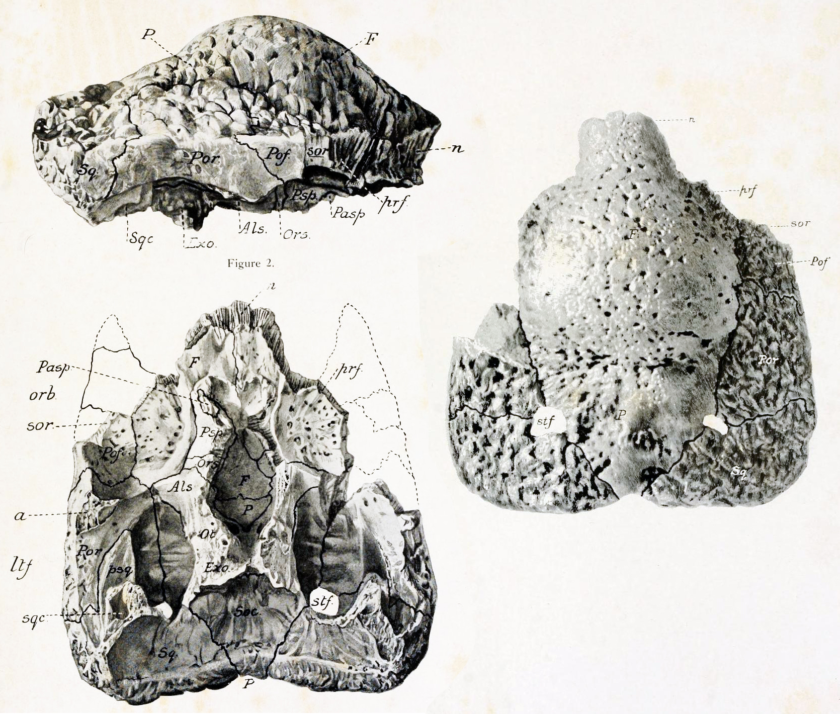 Stegoceras validum dome CMN 138.